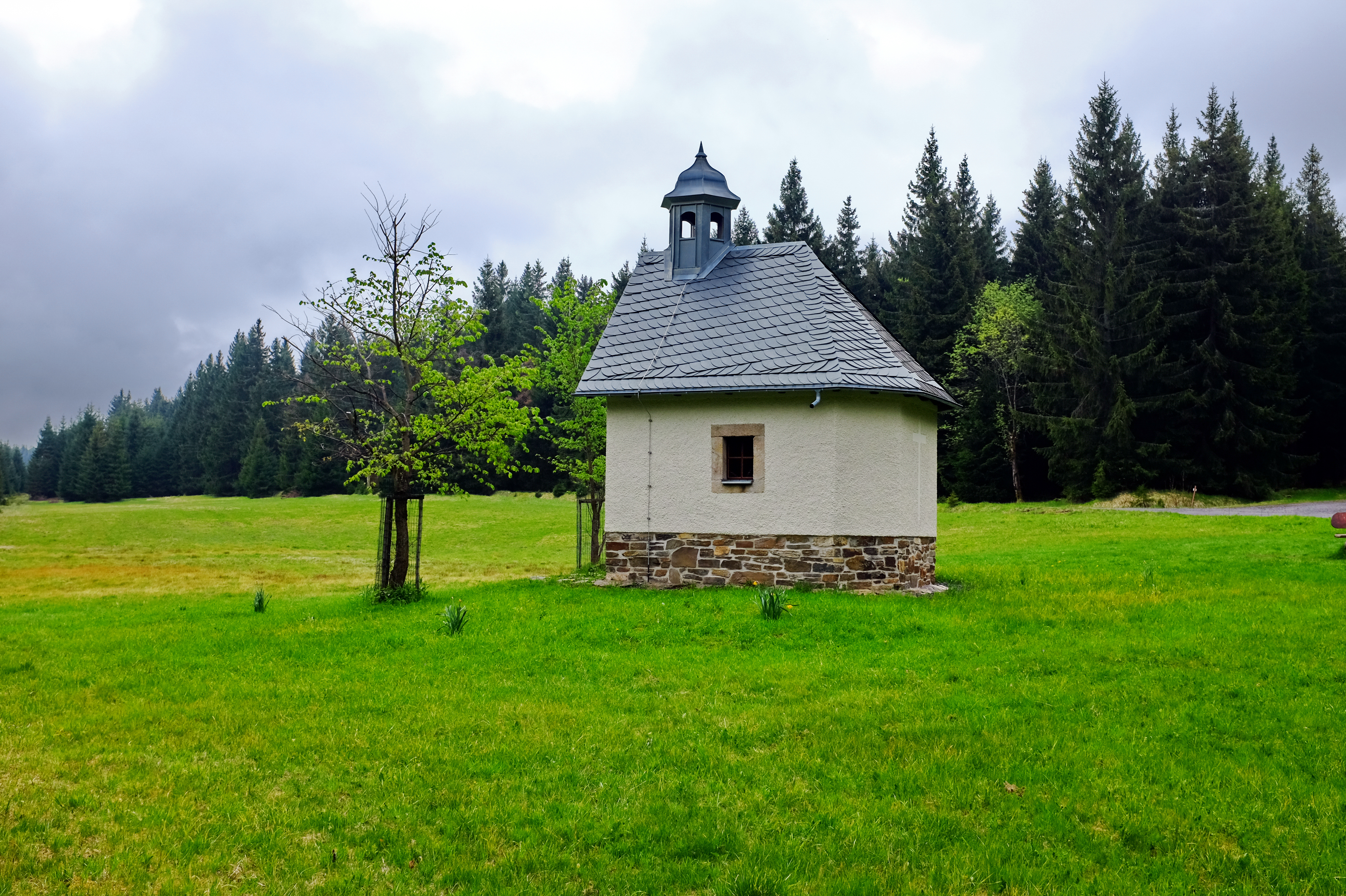 Mílov, zaniklá osada v Krušných horách na hranici se Saskem, kaple sv. Jana Nepomuckého, okres Karlovy Vary